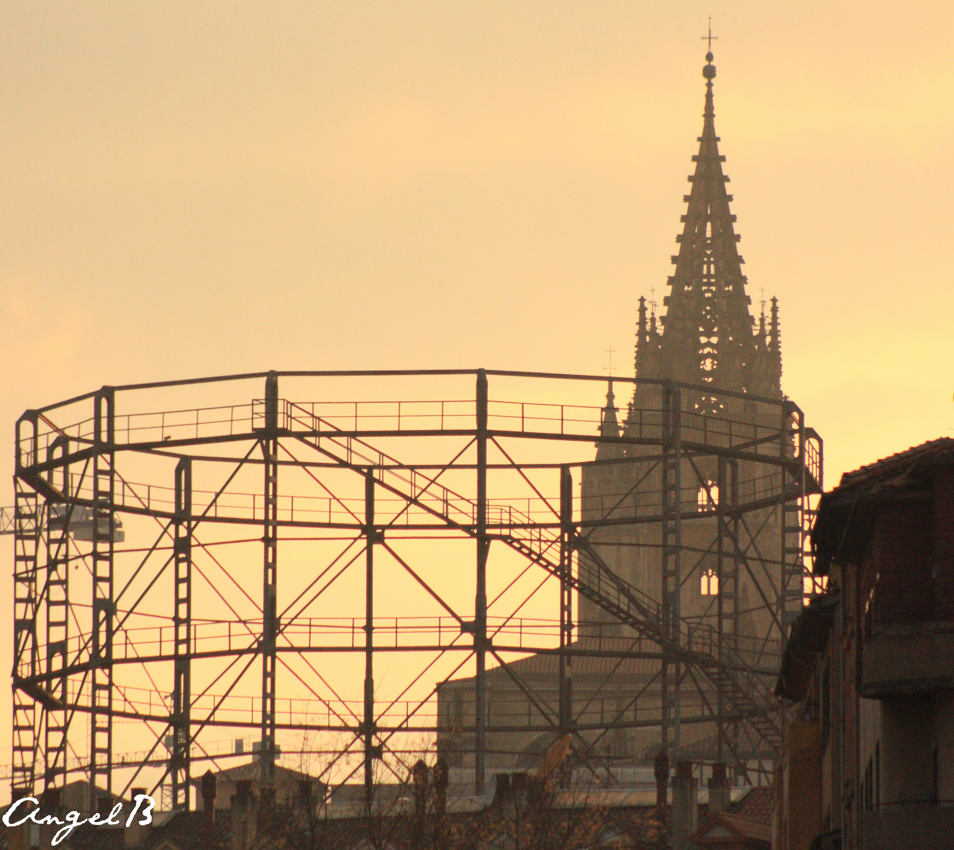 Vista poco común de la Catedral de Oviedo a través de la Fábrica del Gas del Campo de los Patos